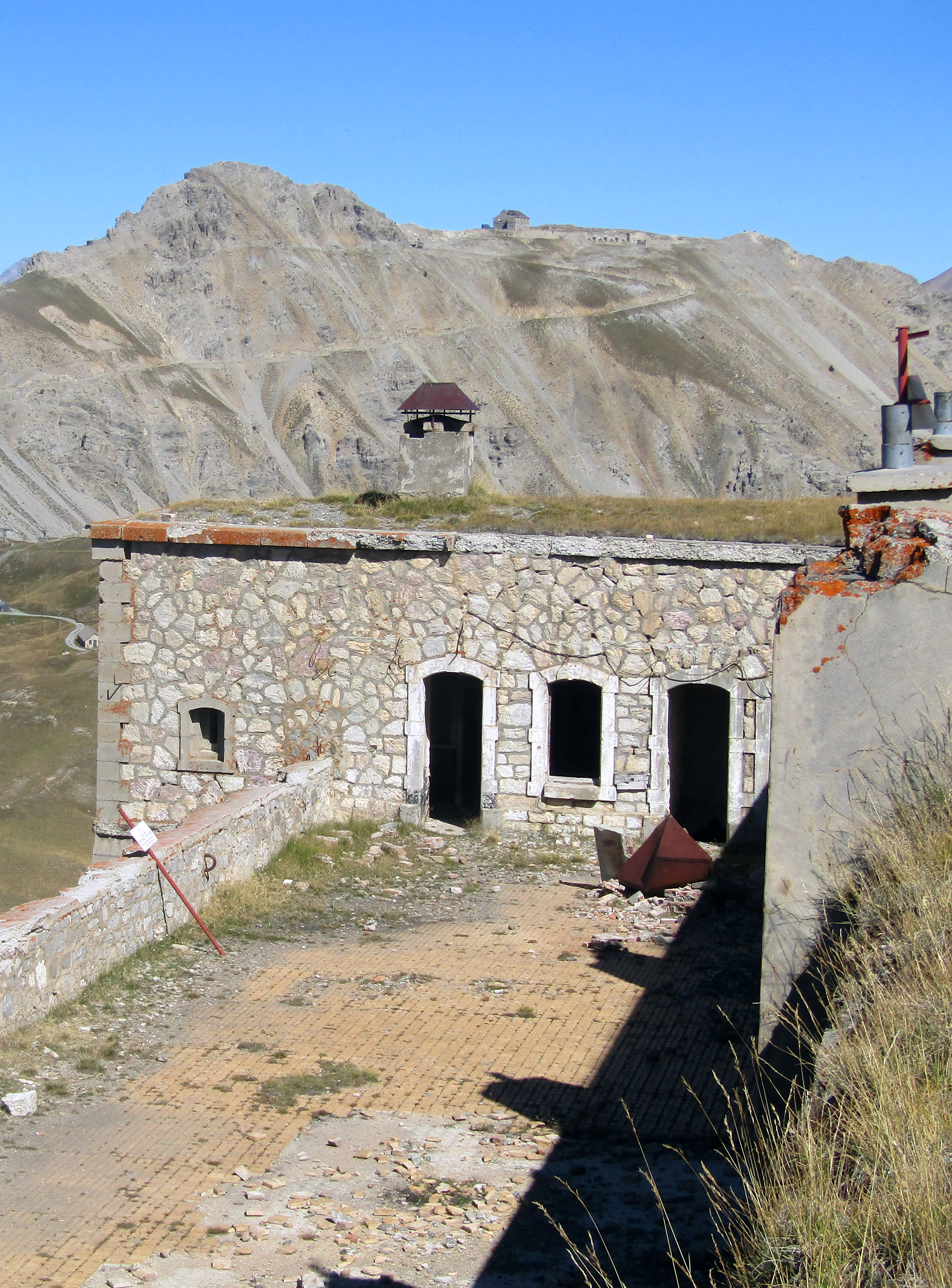 Sommet des Anges: il forte di Gondrans e, sullo sfondo, il monte Château Jouan (Alpi Cozie, Francia)